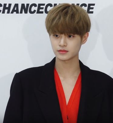 그룹 'AB6IX'의 이대휘, 김동현이 6일 오후 서울 성수동 에스팩토리에서 열린 '챈스챈스(CHANCE CHANCE)' 19SS 컬렉션에 참석했다.